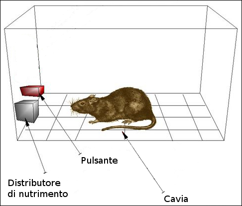 Formattazione in lingua italiana di una immagine trovata su Commons